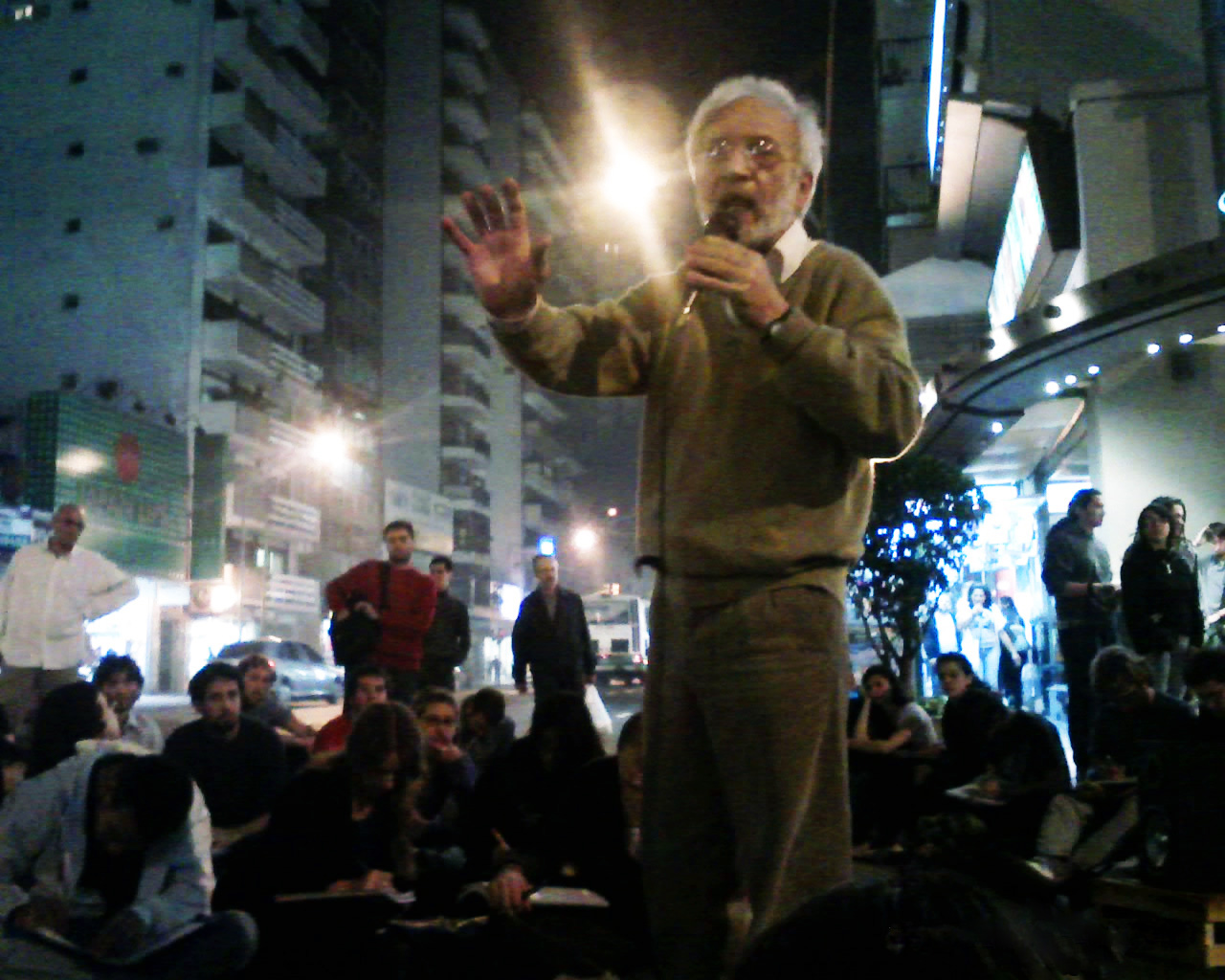 El filósofo y docente argentino Carlos Federico Savranksy, durante una clase pública de la Universidad de Buenos Aires.